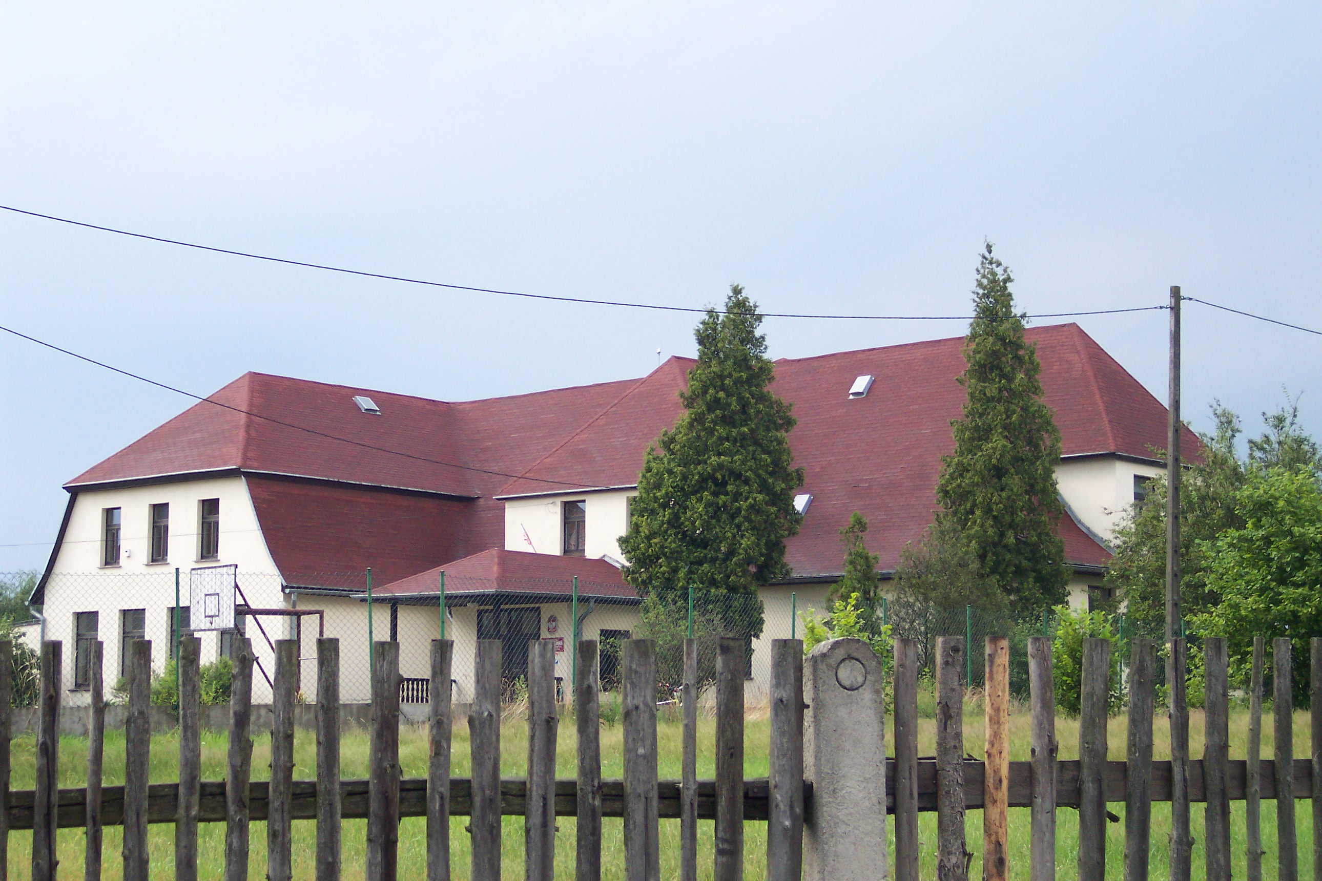 Szkoła podstawowa w Kadłubie Wolnym)